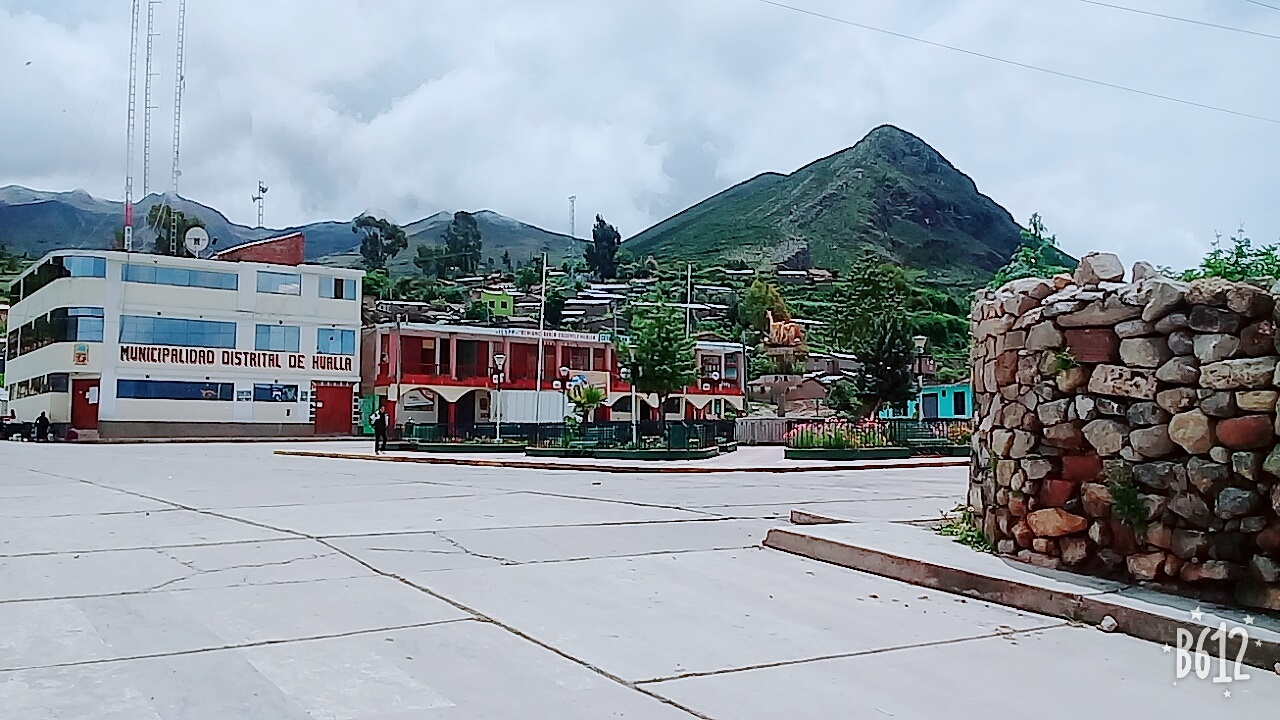 distrito de Hualla Runa Simi: llaqta Hualla